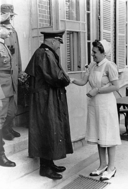 Generalfeldmarschall von Kluge im Westen Der neuernannte Oberbefehlshaber West, Generalfeldmarschall von Kluge, befand sich in den letzten Tagen auf einer Besichtigungsfahrt an der Kanalküste. Er besuchte die dort eingesetzten Divisionen und informierte sich über den Stand der Verteidigungs- und Abwehrmaßnahmen im Falle einer erneuten Landung des Feindes. Der Generalfeldmarschall, in dessen Begleitung sich ein Divisionskommandeur befindet, verabschiedet sich in einem Soldatenheim von einer DRK-Schwester.